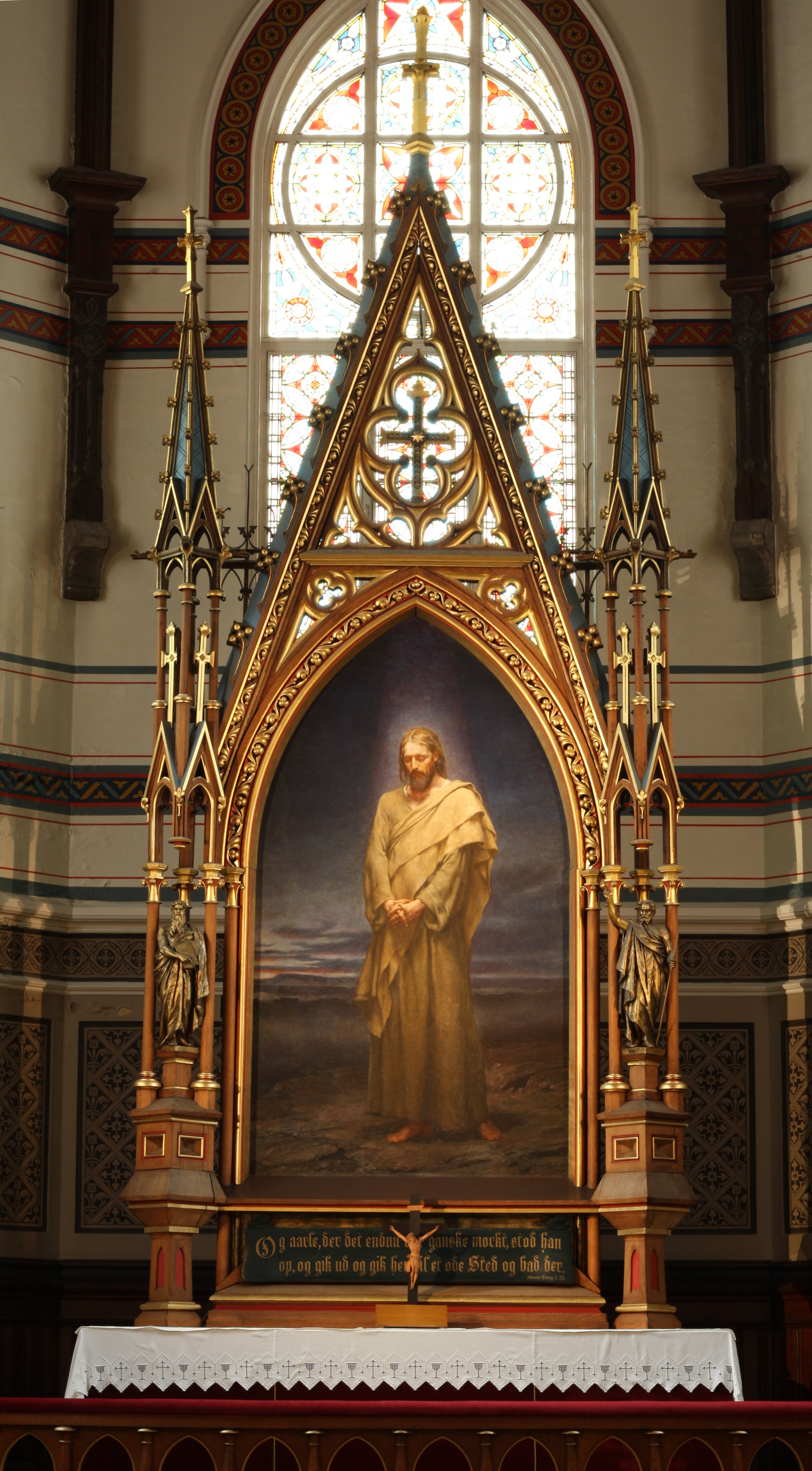 Bilde av alteret i Johanneskirken i Bergen